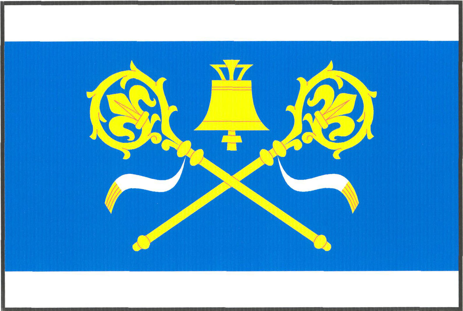 Vlajka obce Krásné (okres Chrudim)